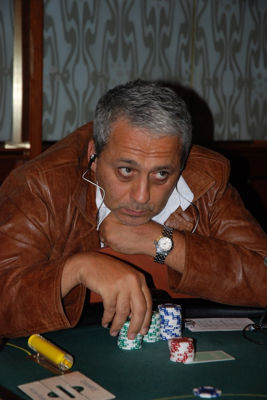 Ivo Donev